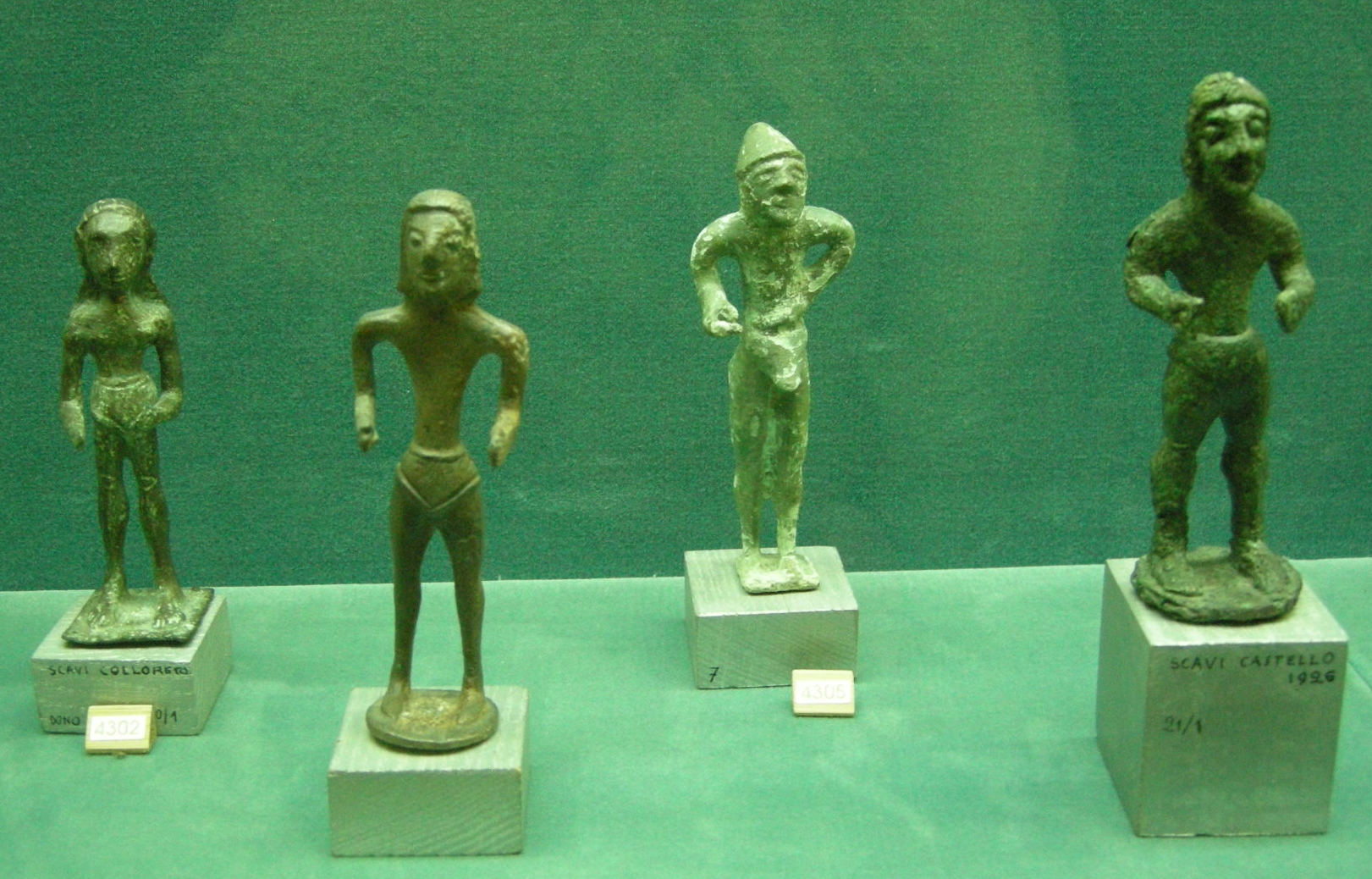 Museo guarnacci, bronzetti antropomorfi etruschi, metà vii sec. ac.